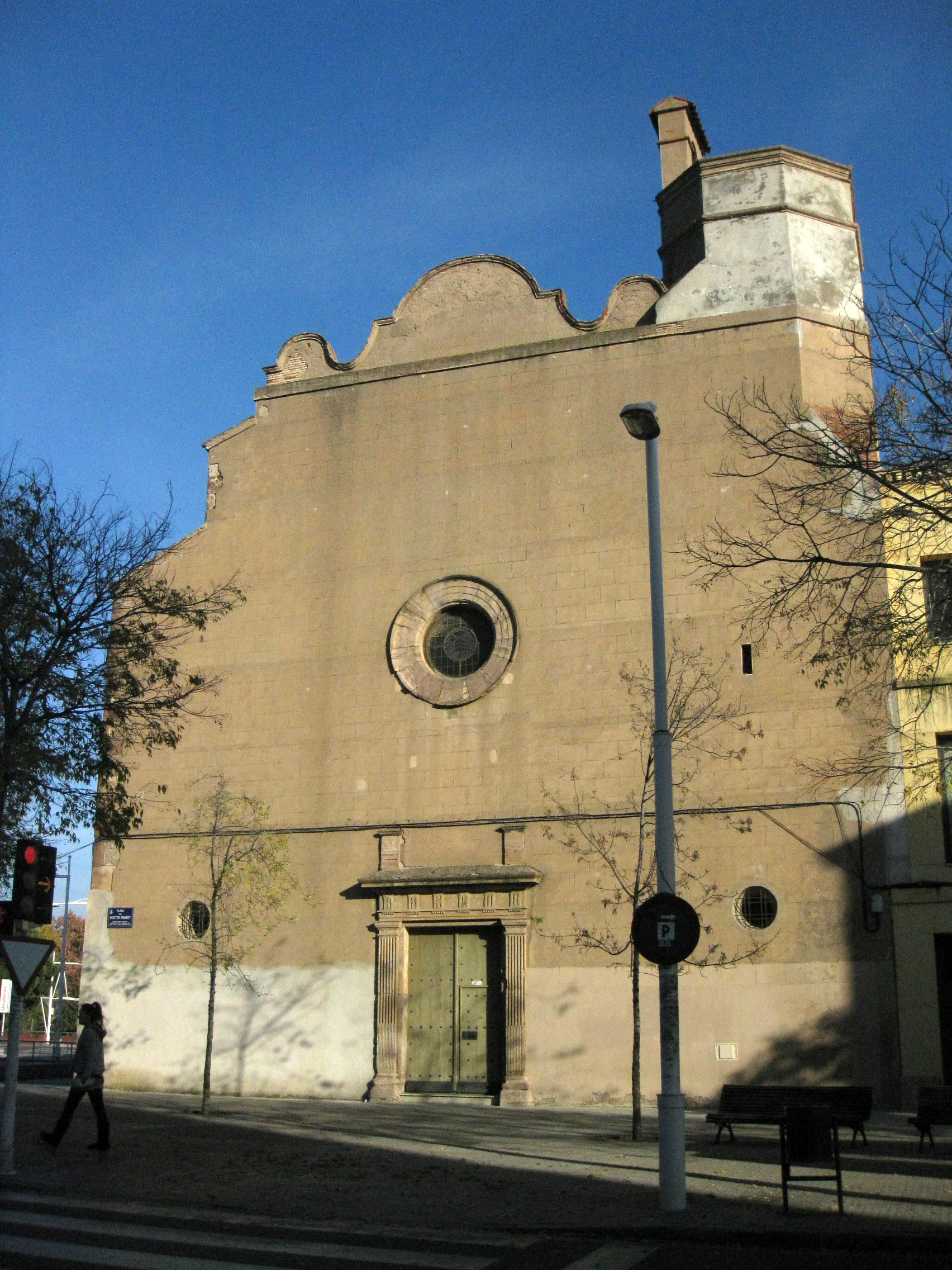 Església de Sant Francesc d'Assís, a la plaça del Doctor Robert (Terrassa). Edifici a cavall entre el gòtic tardà i el Renaixement, del segle XVII.